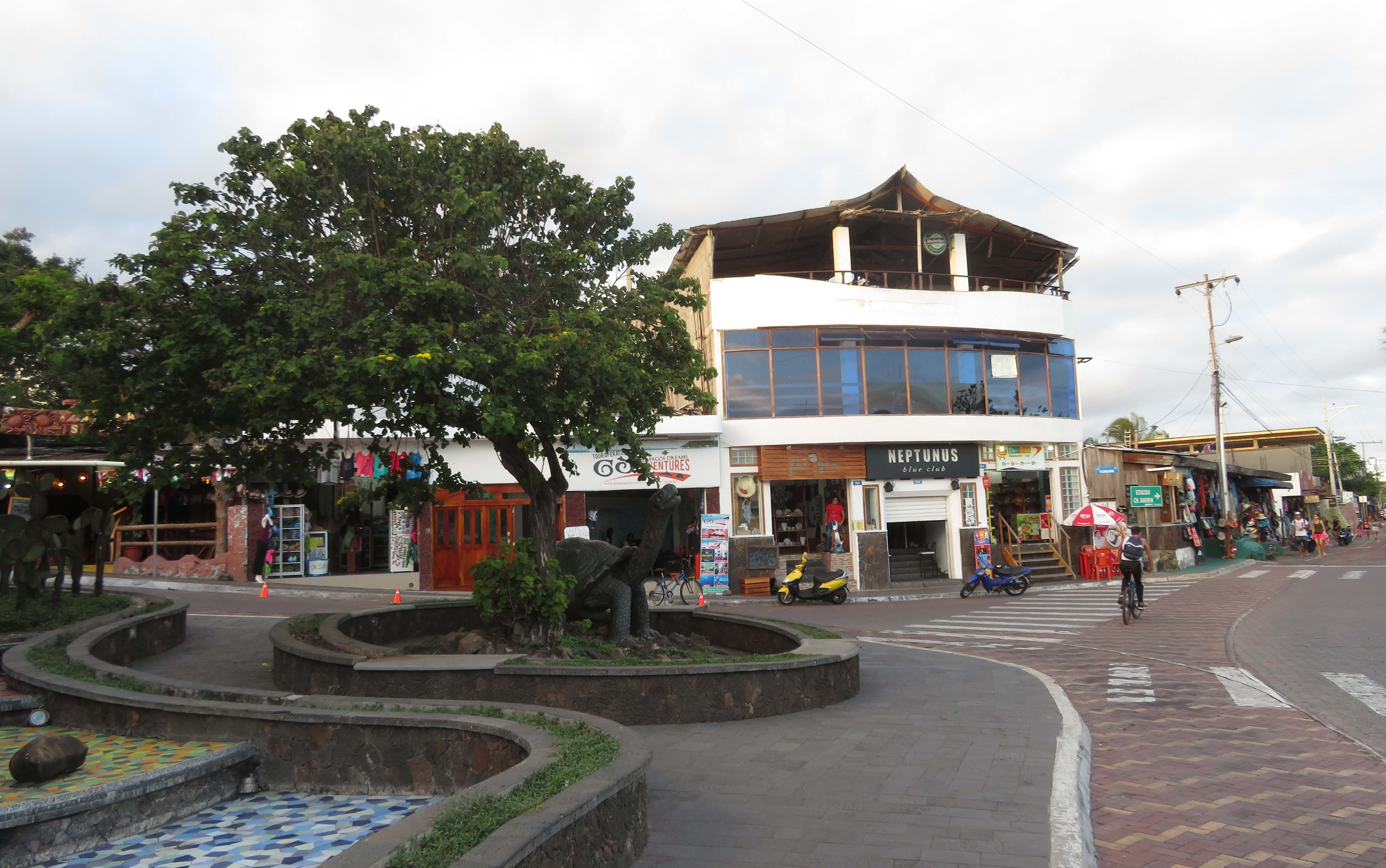 Avenida Charles Darwin, Puerto Ayora, Isla Santa Cruz, Islas Galápagos, Ecuador